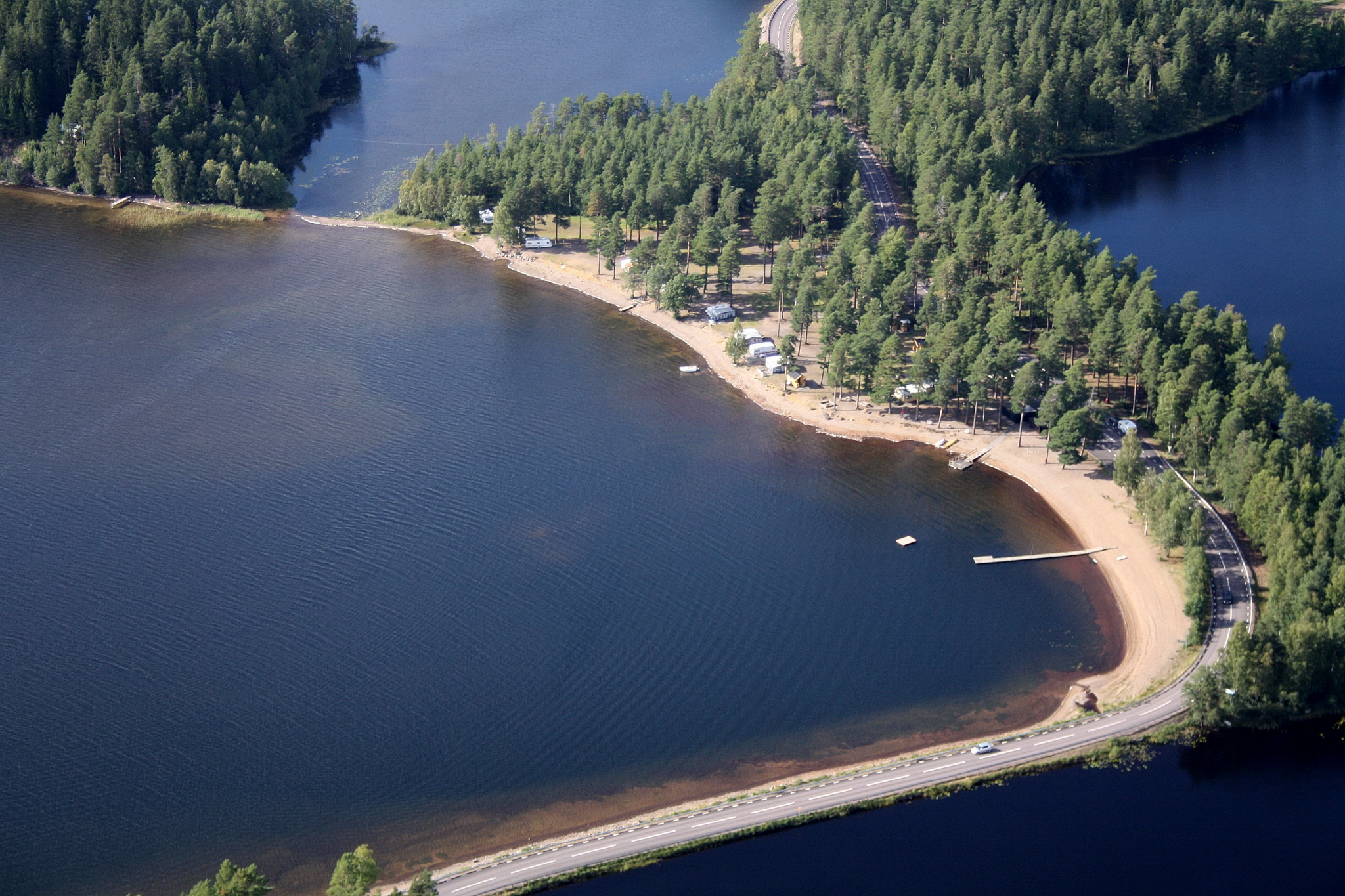 Badplatsen Reveln, Östra Laxsjön, Laxå sedd från luften, sjön i nederkant bilden fram till vägbanken heter Östersjön